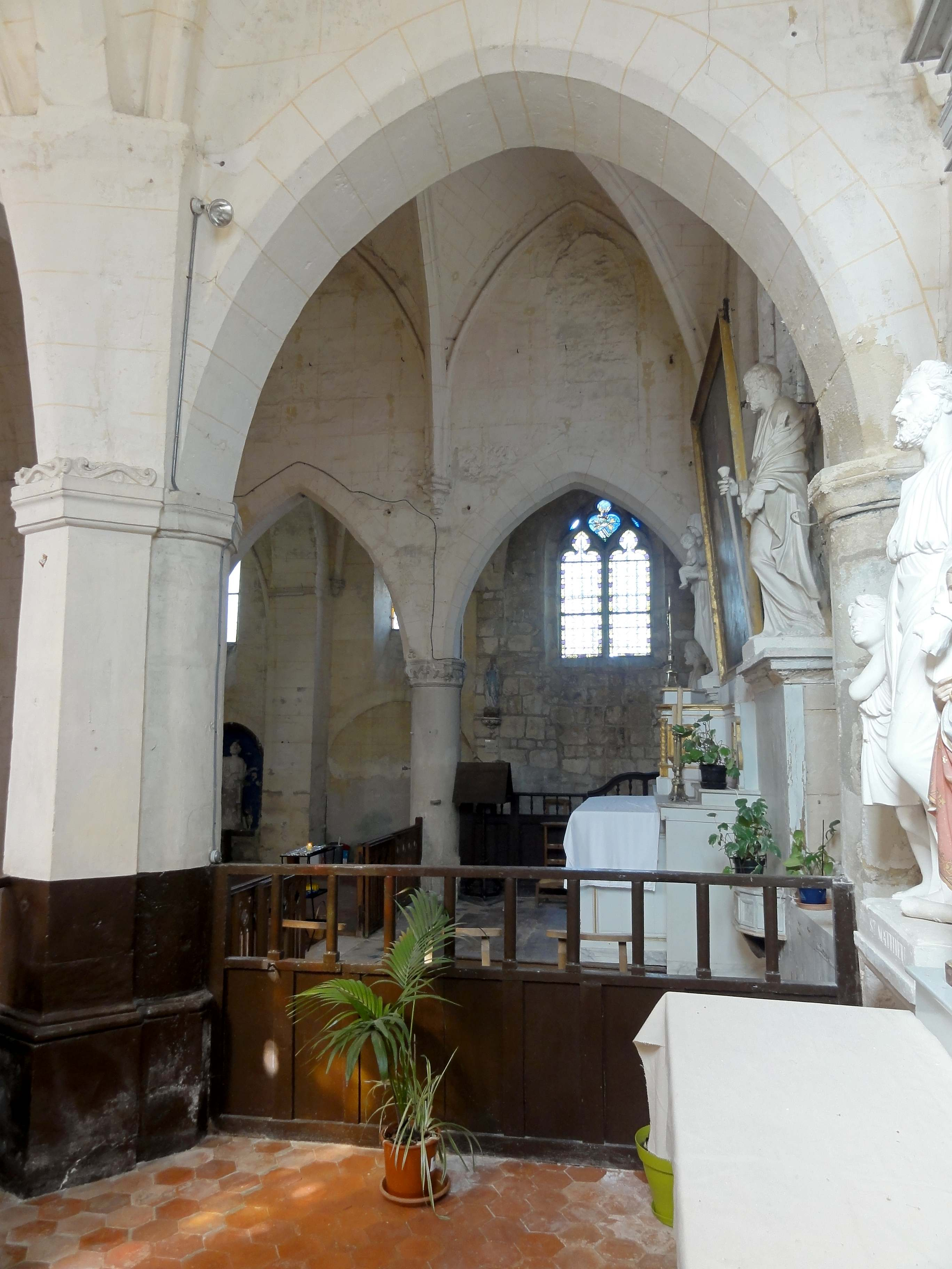 Intérieur de l'église - voir titre.